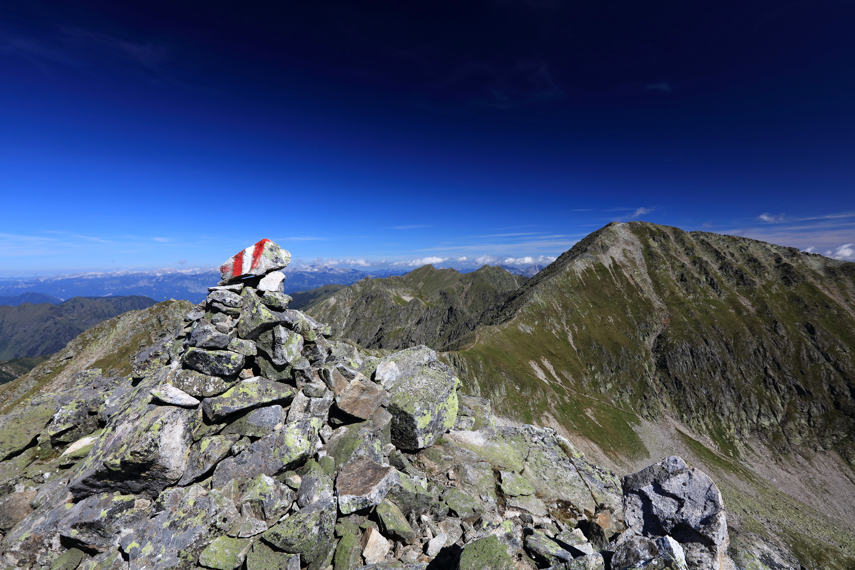 Gemeinde Hohentauern, 8785, Austria